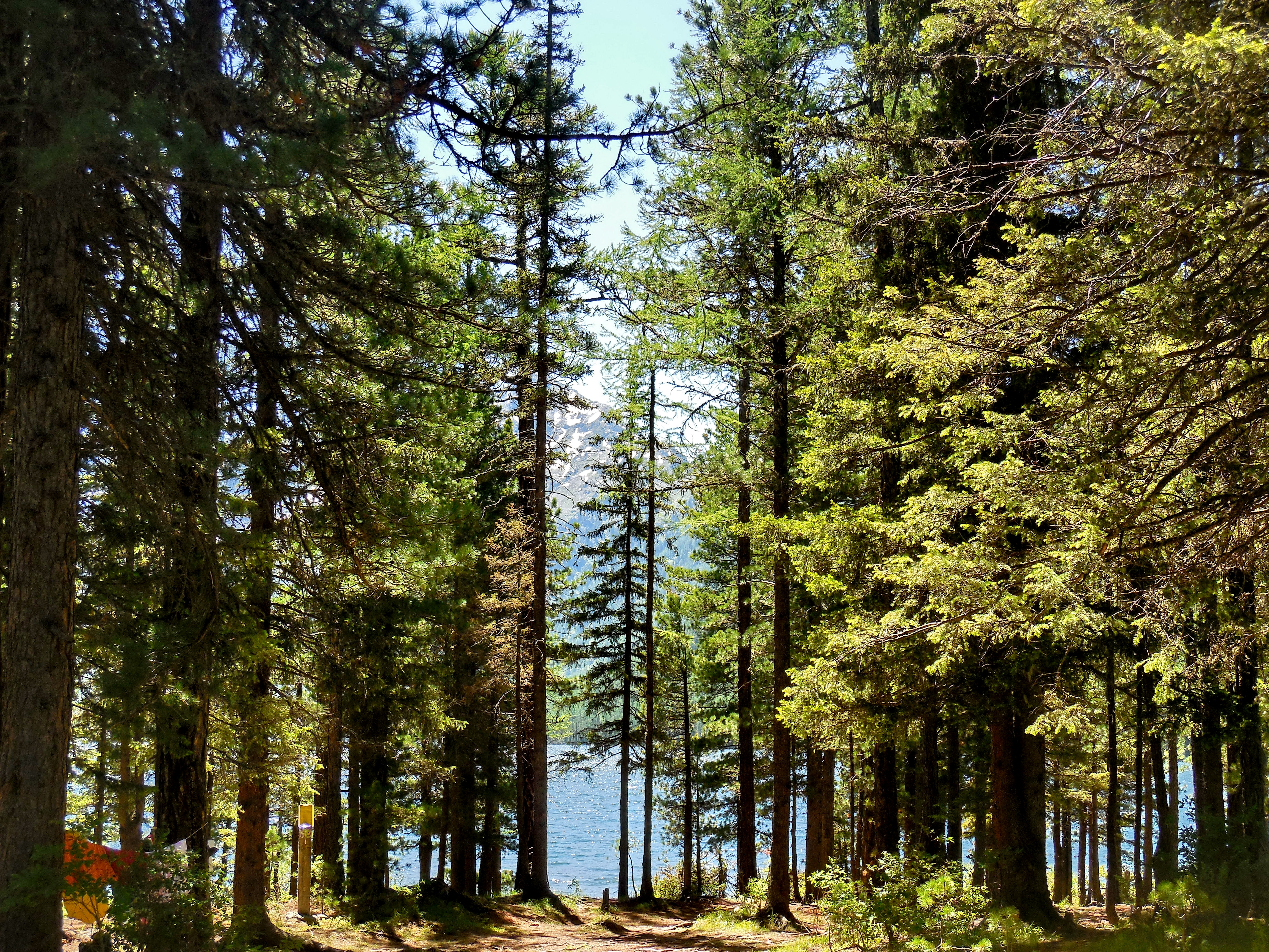 Горный Алтай